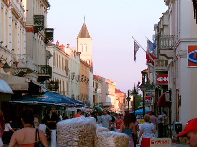 Корзо у Битољу